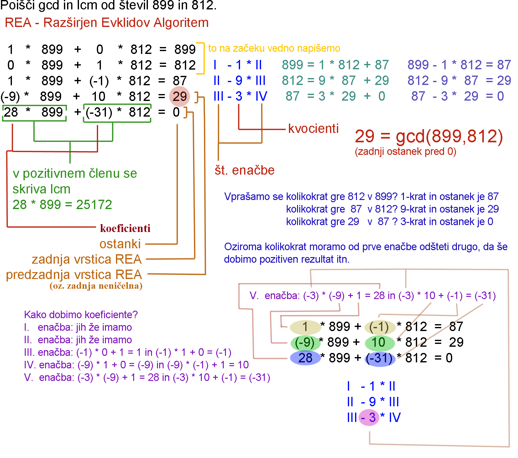 Postopek razširjenega Evklidovega algoritma.